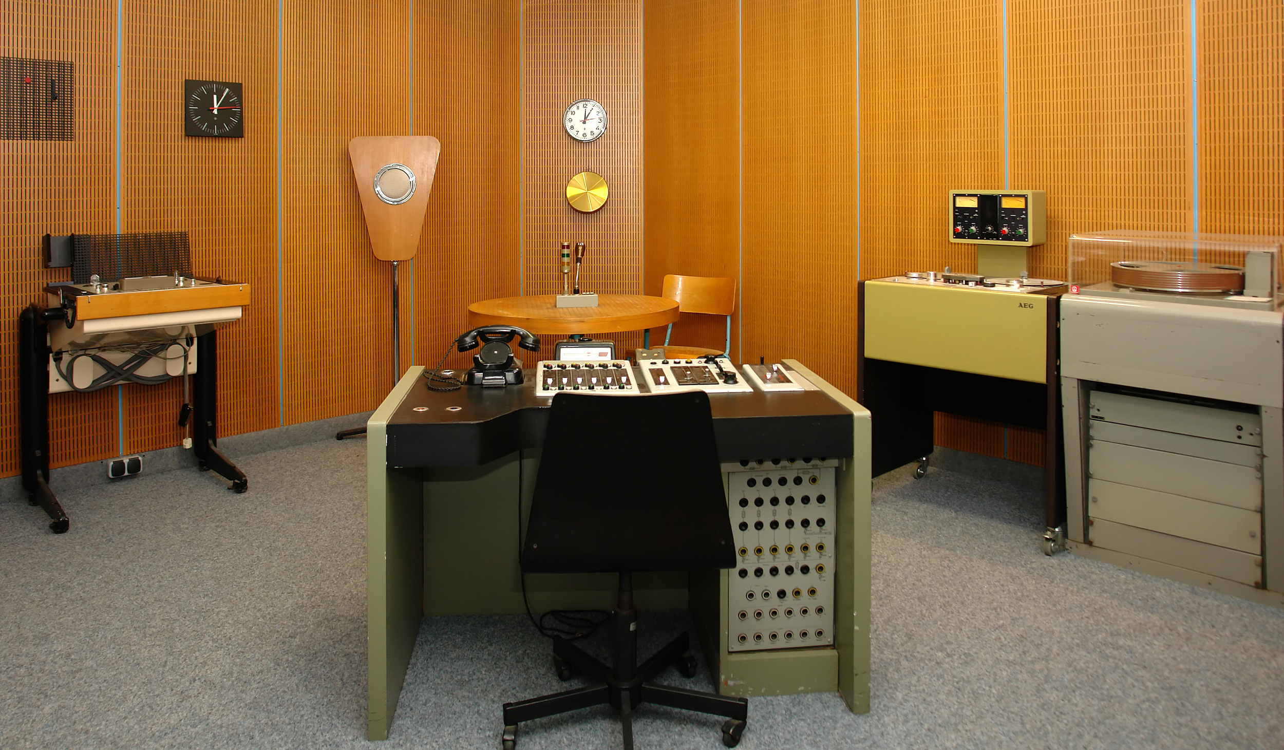 Bremer Rundfunkmuseum: Hörfunkstudio 1950er Jahre. AEG Magnetophon 21, Sprechertisch, AEG Magnetophon 15A, Pausenzeichenmaschine R-79 von RTI Nürnberg, Sendepult